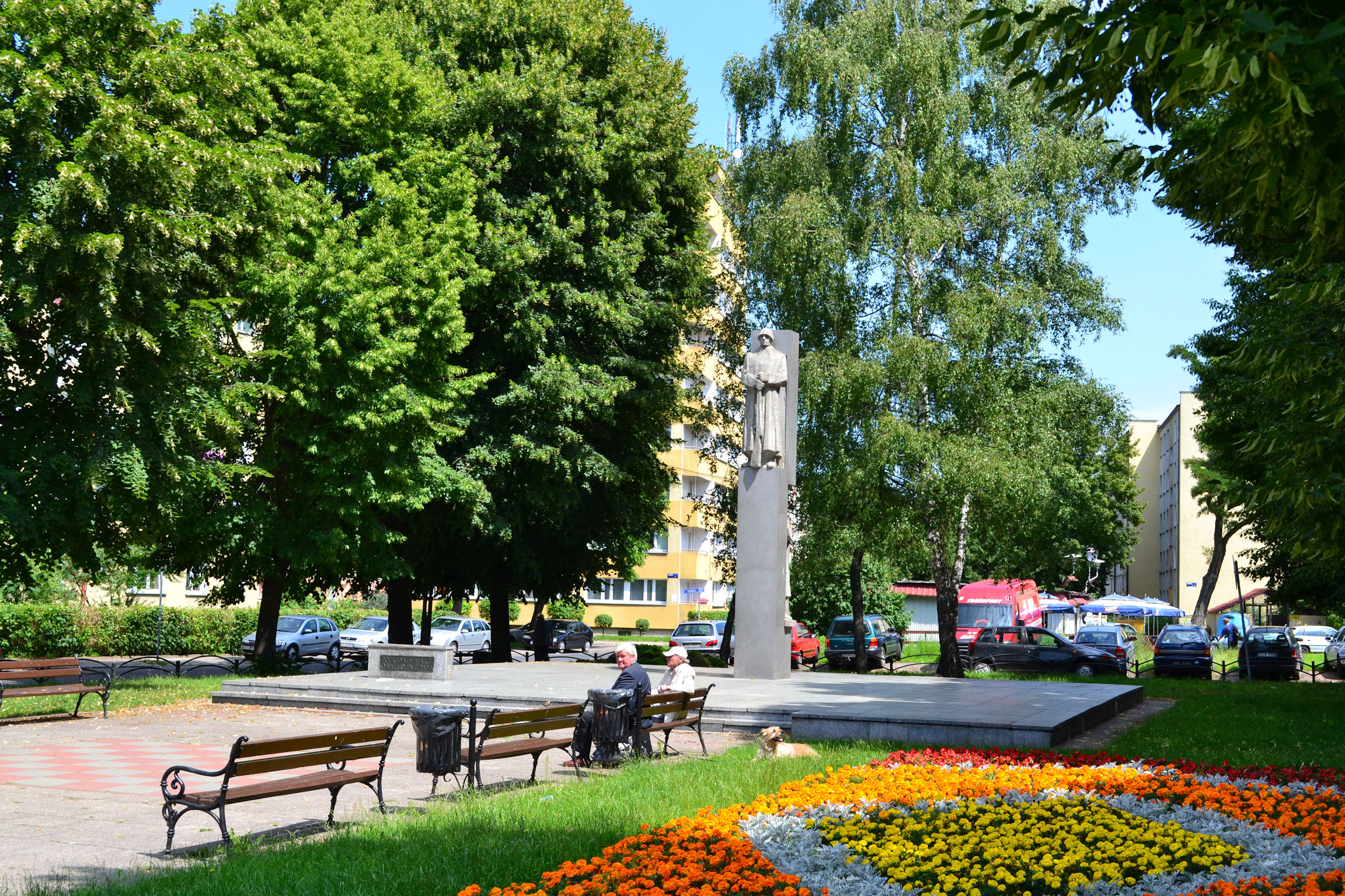 Pomnik "Poległym w walce o wyzwolenie Dąbia” w Szczecinie-Dąbiu